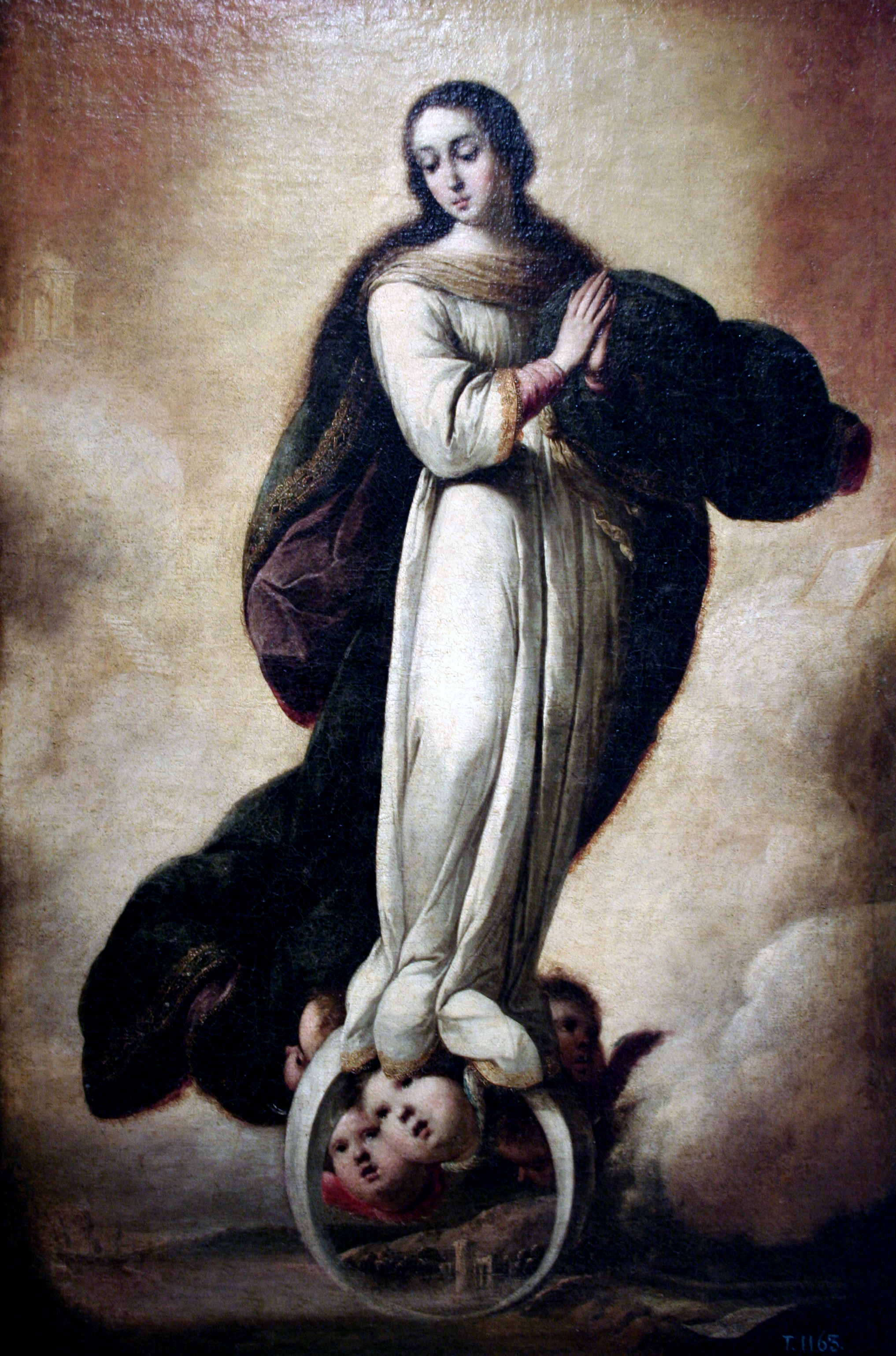 Cornelio Schut. Imaculada Concepción. Hacia 1680.Óleo sobre lienzo. 0,83 x 0,55 m. Museo de Bellas Artes de Sevilla.